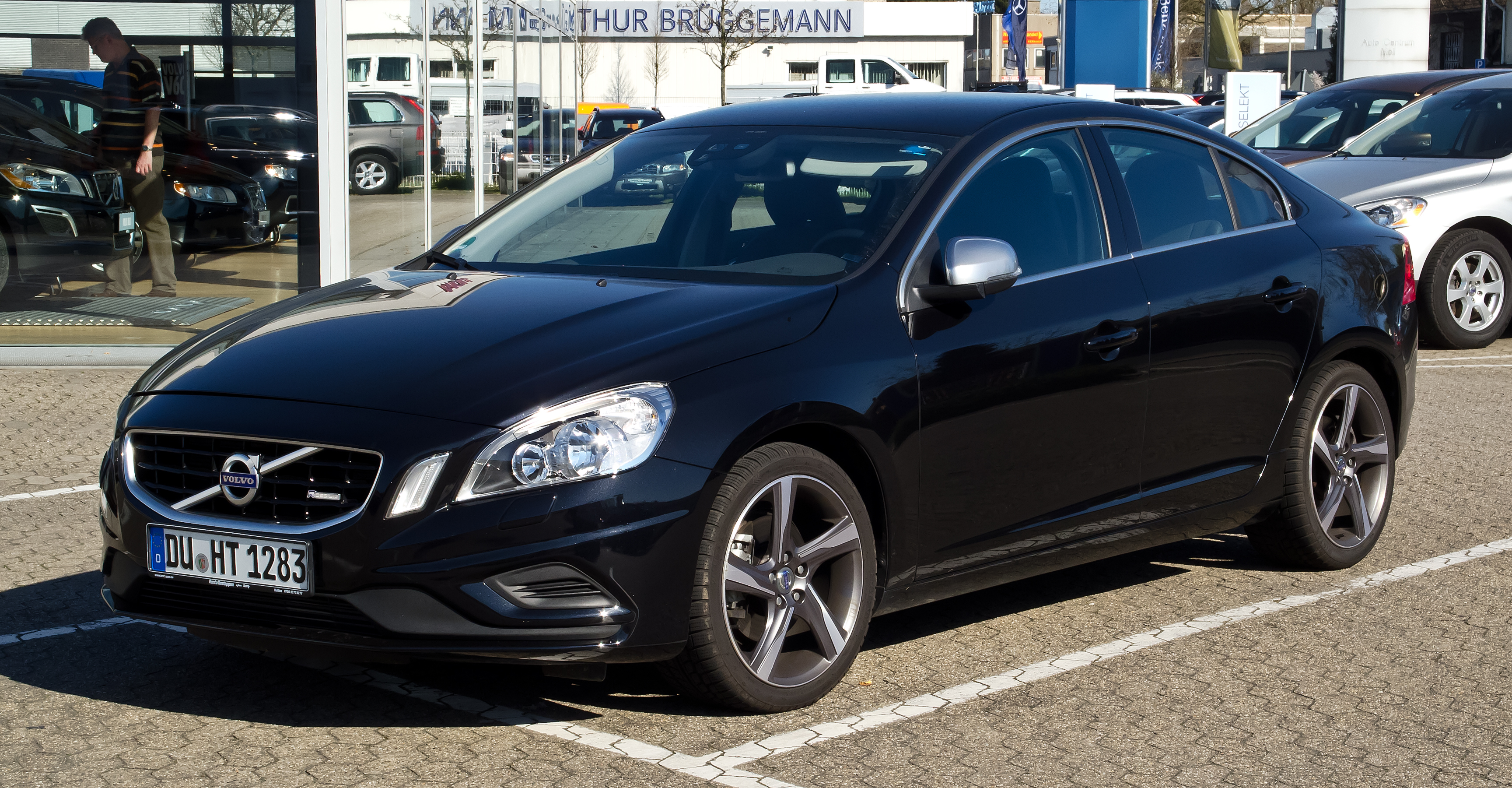 Volvo S60 D5 R-Design (II)